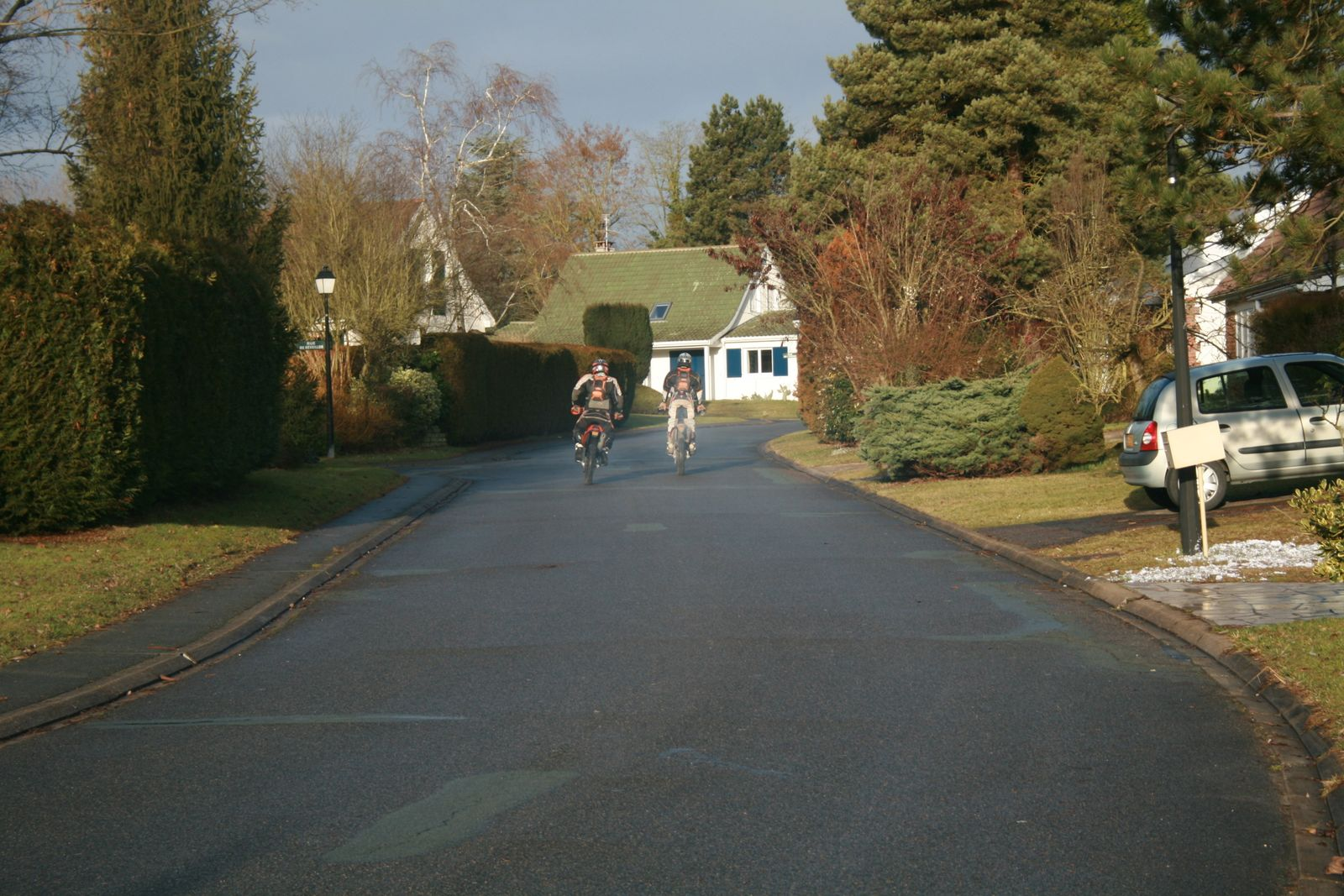 Quartier résidenciel du Parc de Lésigny, Lésigny (Seine-et-Marne).